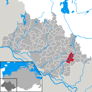 Grabow in Mecklenburg-Vorpommern - district Ludwigslust